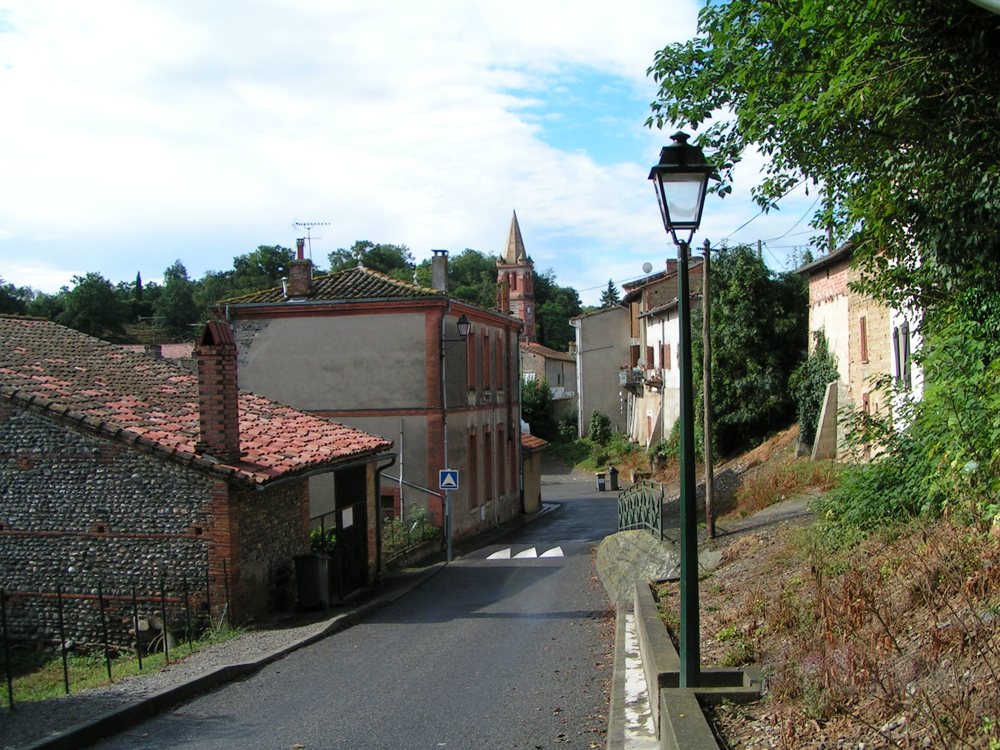 Marquefave